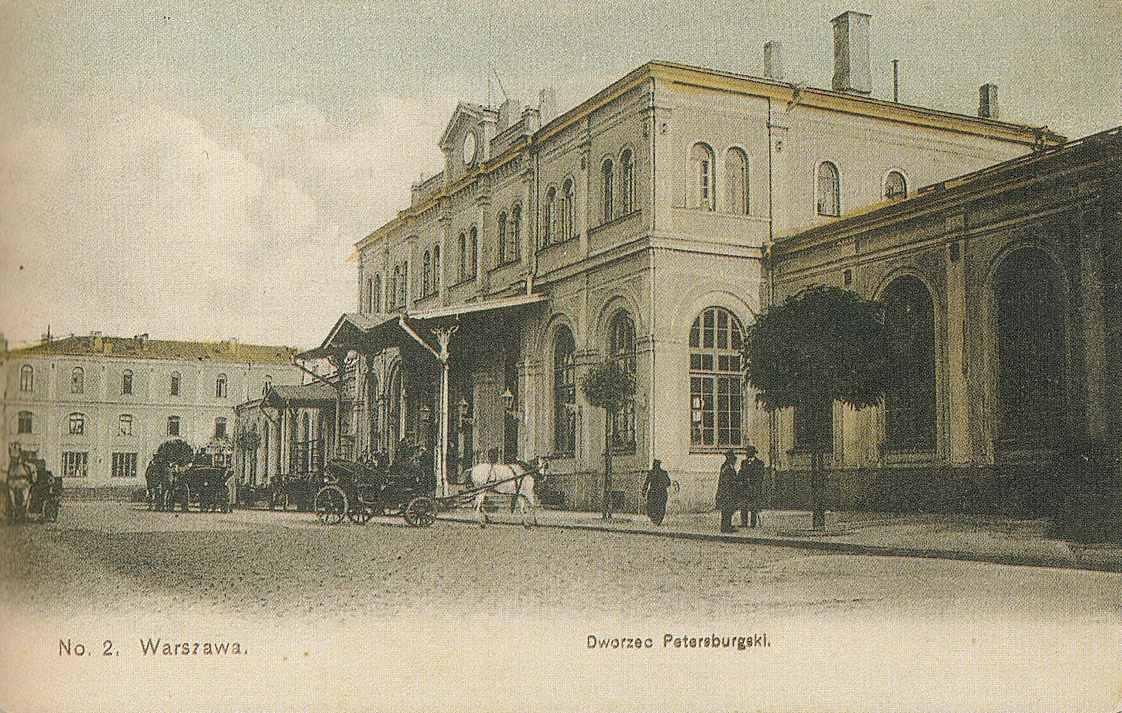 Dworzec Petersburski w Warszawie